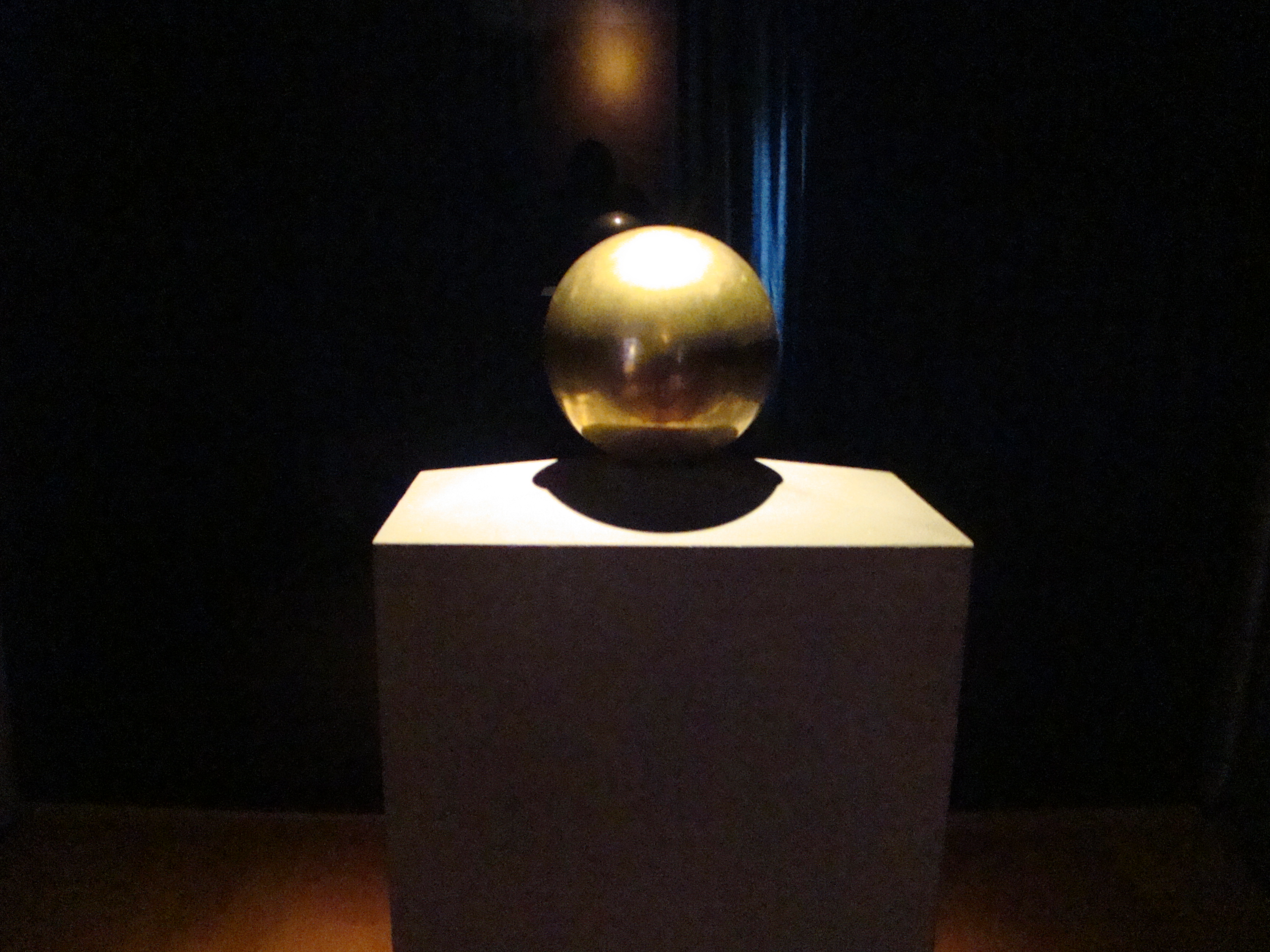 Belgrade, Serbia ~ Tesla Museum ~ Tesla's Ashes.